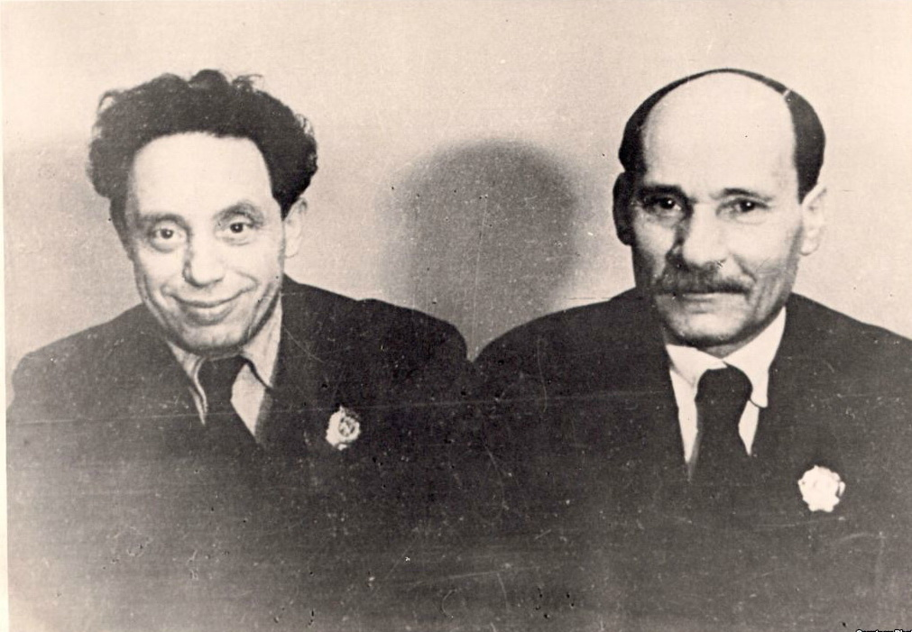 Змітрок Бядуля і Я. Колас у дзень узнагароджання ордэнамі